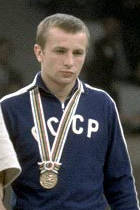 Eric Hänni, Takehide Nakatani, Oleg Stepanov, 1964 Olympics